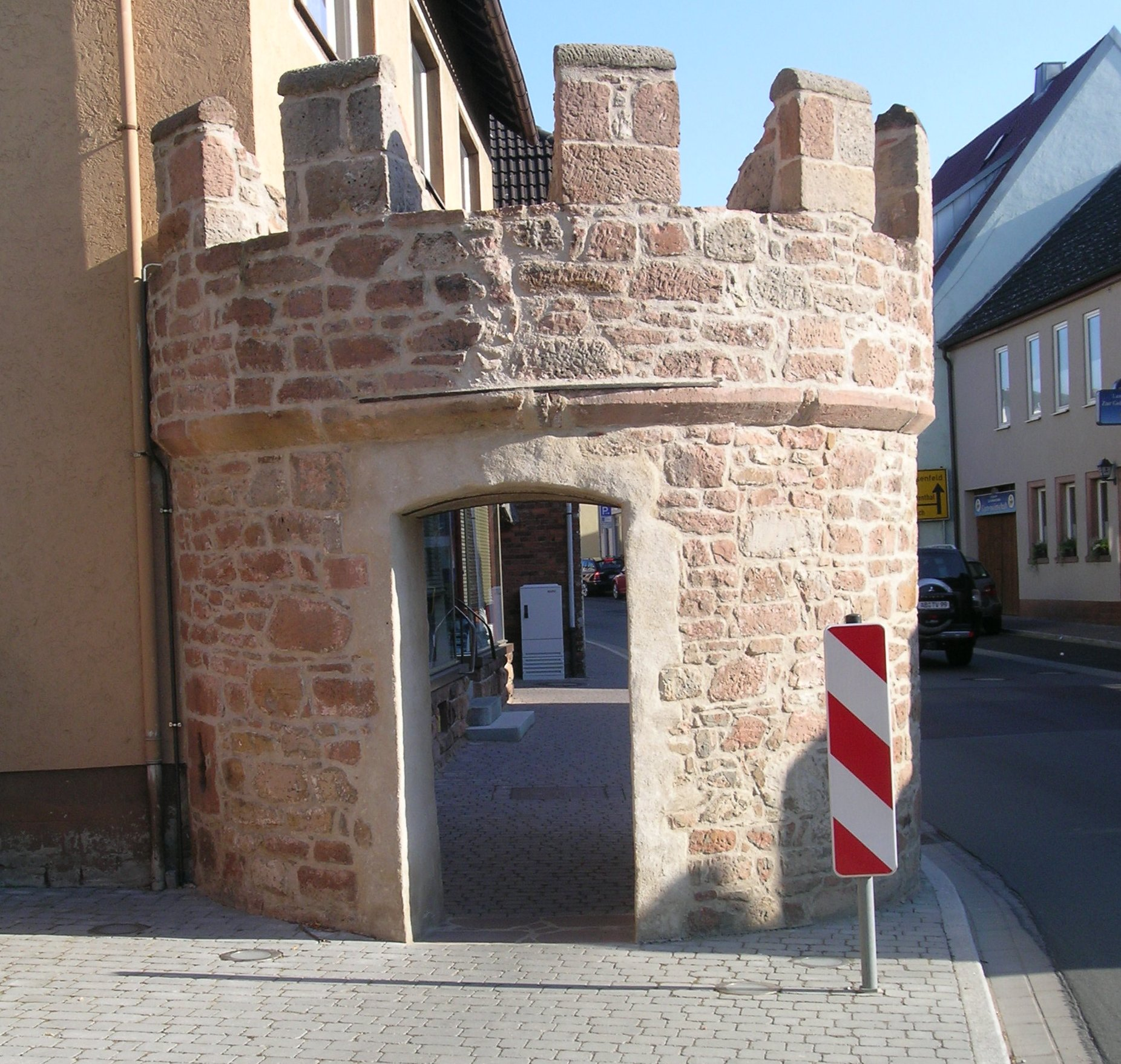 Rundturm mit Zinnen, ehemaliges Tor der Marktbefestigung, um 1500, Bahnhofstraße, Sulzbach am Main This is a photograph of an architectural monument.